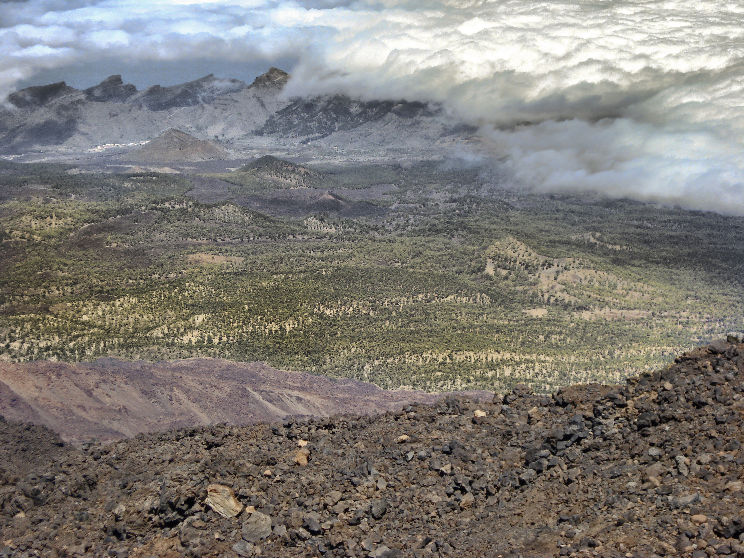 Vulkan "Chinyero" mit schwarzen Lavaresten. Blick vom "Teide".